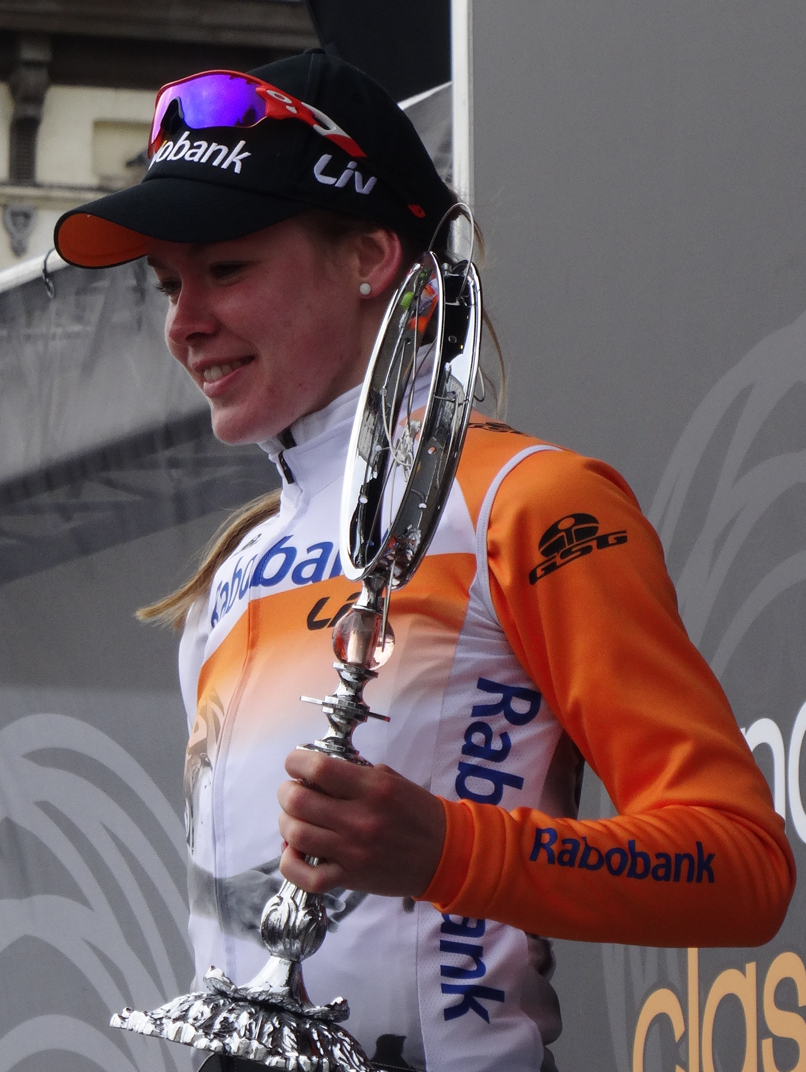 Reportage réalisé le samedi 28 février à l'occasion du départ et de l'arrivée du Circuit Het Nieuwsblad 2015 à Gand, Belgique.